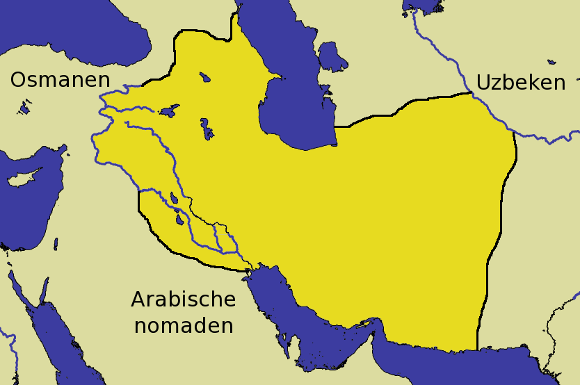 Het rijk van de Safawiden toen het op zijn grootst was in 1512. Twee jaar later zou het Mesopotamië en andere delen verliezen aan de Ottomanen. Source: Islam, art and architecture. Edited by Markus Hattstein adn Peter Delius. ISBN 3-8331-1178-X Zelf gemaakt met de GIMP, op basis van een kaart van Danielm. Made myself with the GIMP, on a base map provided by Danielm.